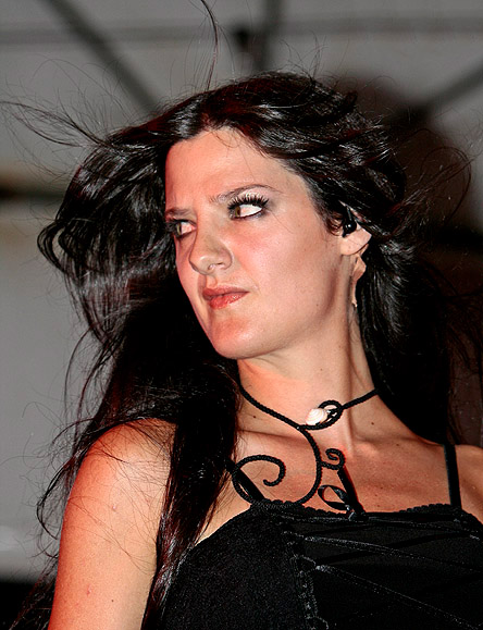 Zuberoa Aznárez en el XIII Festival Revoltallo 2010 (Vigo)